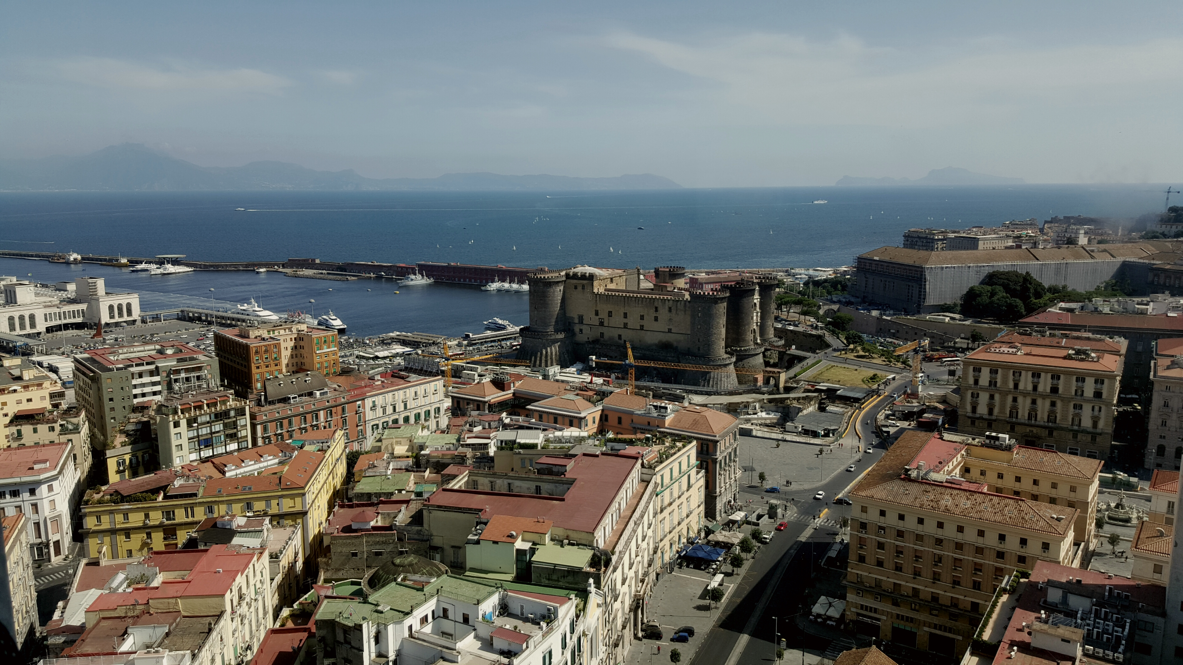 Italia - Napoli